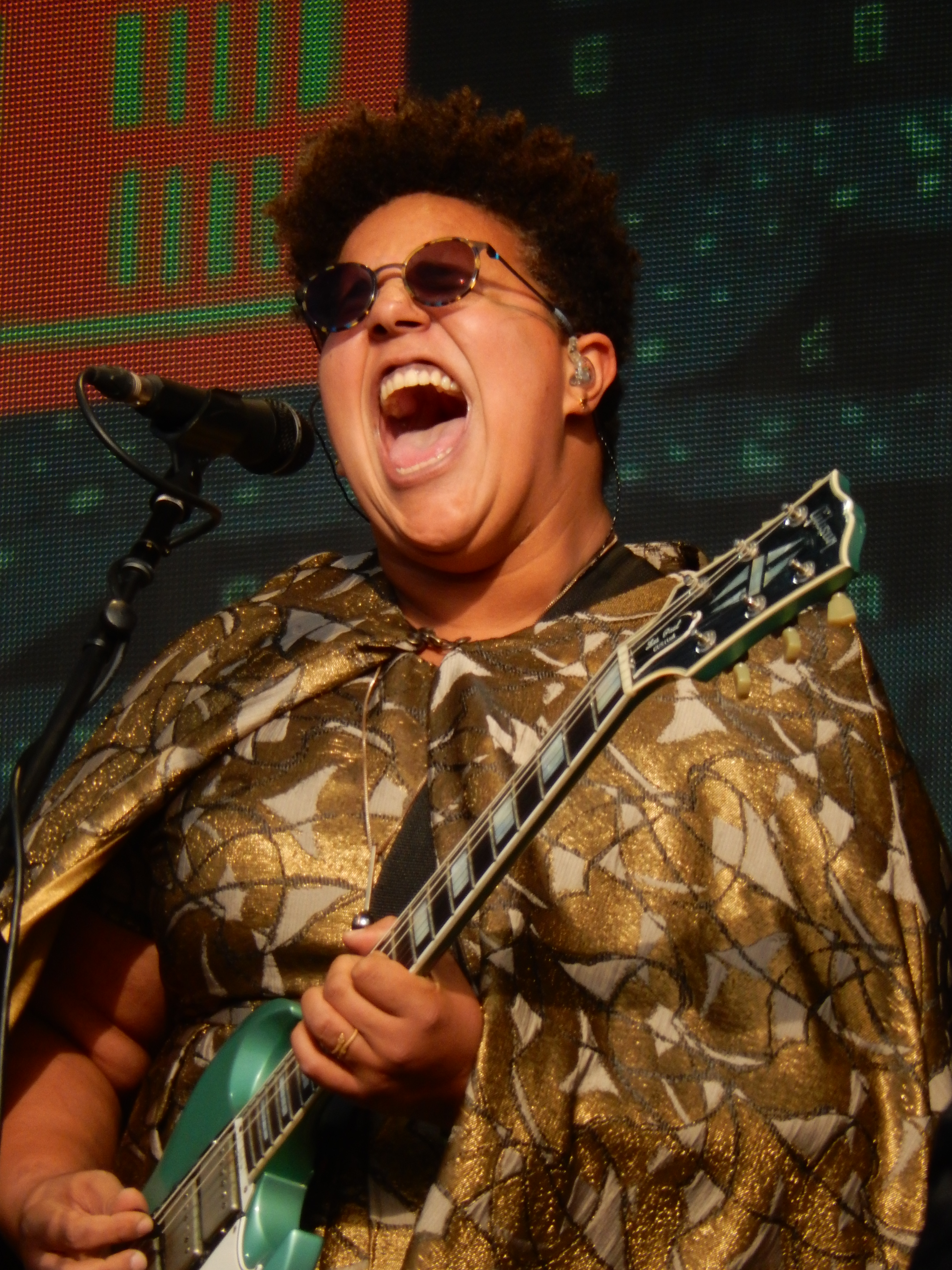 Alabama Shakes, Hyde Park, London